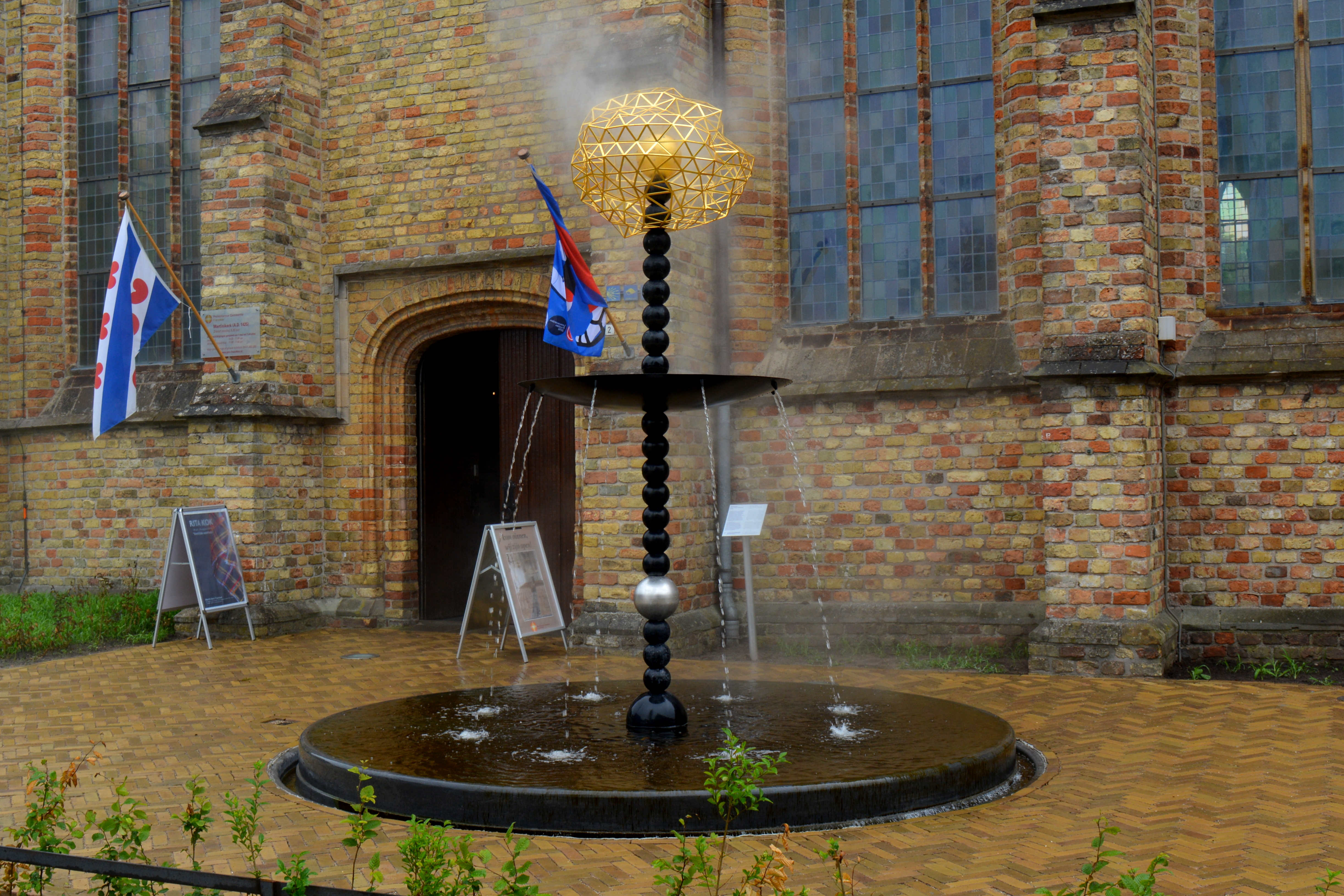 Frjentsjer, Oortwolk-fontein (Jean-Michel Othoniel)